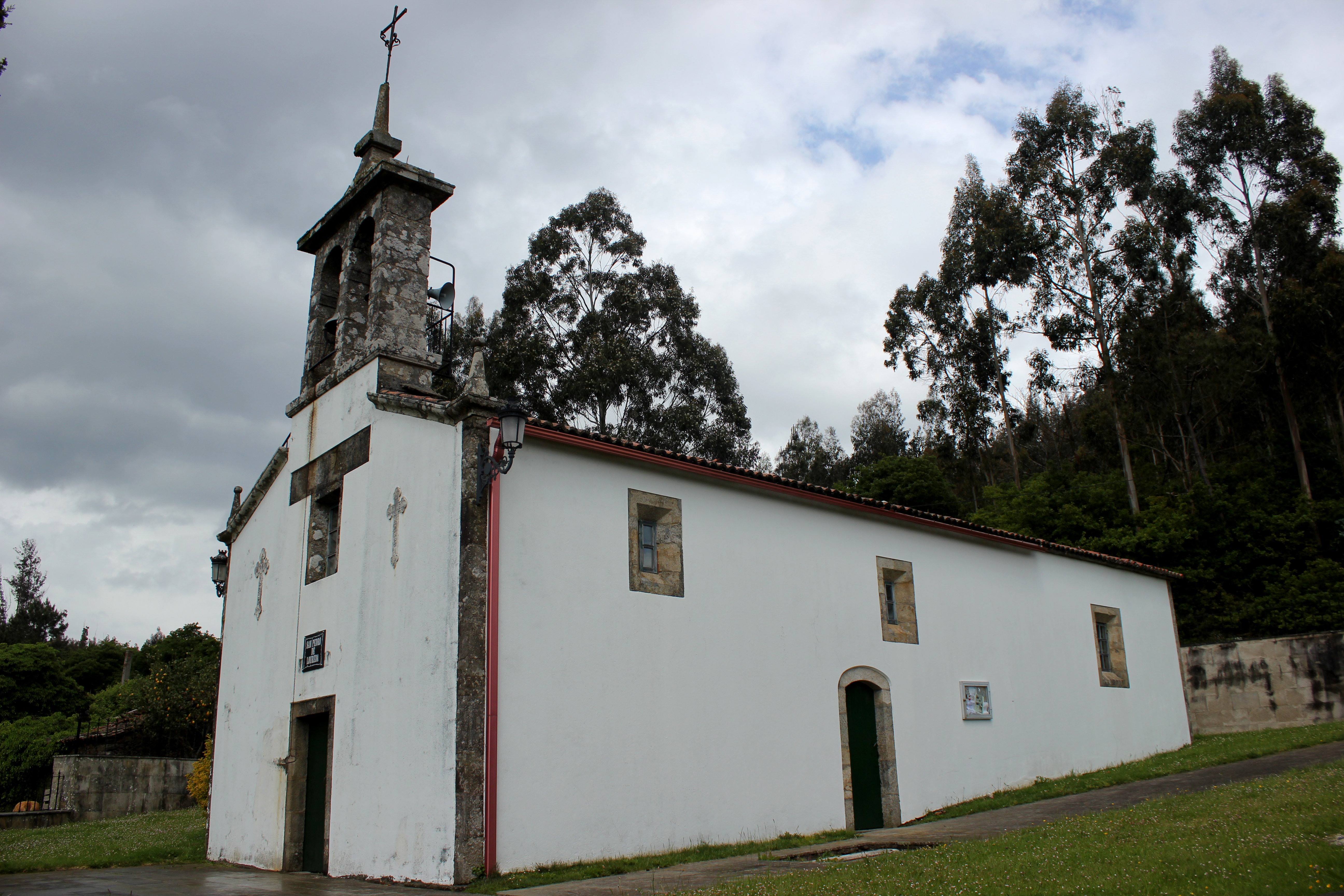 Igrexa de Loureda, Boqueixón.